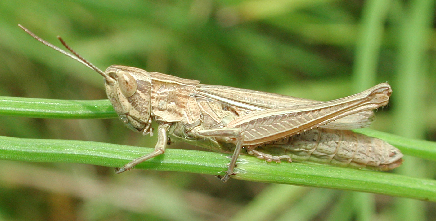 Chorthippus albomarginatus, f., Weißrandiger Grashüpfer, Weibchen, sandfarbene Farbvariante, NSG Kirchwerder Wiesen, Elbmarsch bei Hamburg, Deutschland